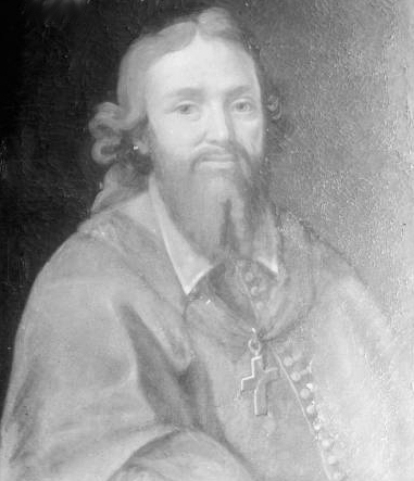 Portrait de Daniel de la Mothe Duplessis-Houdancourt